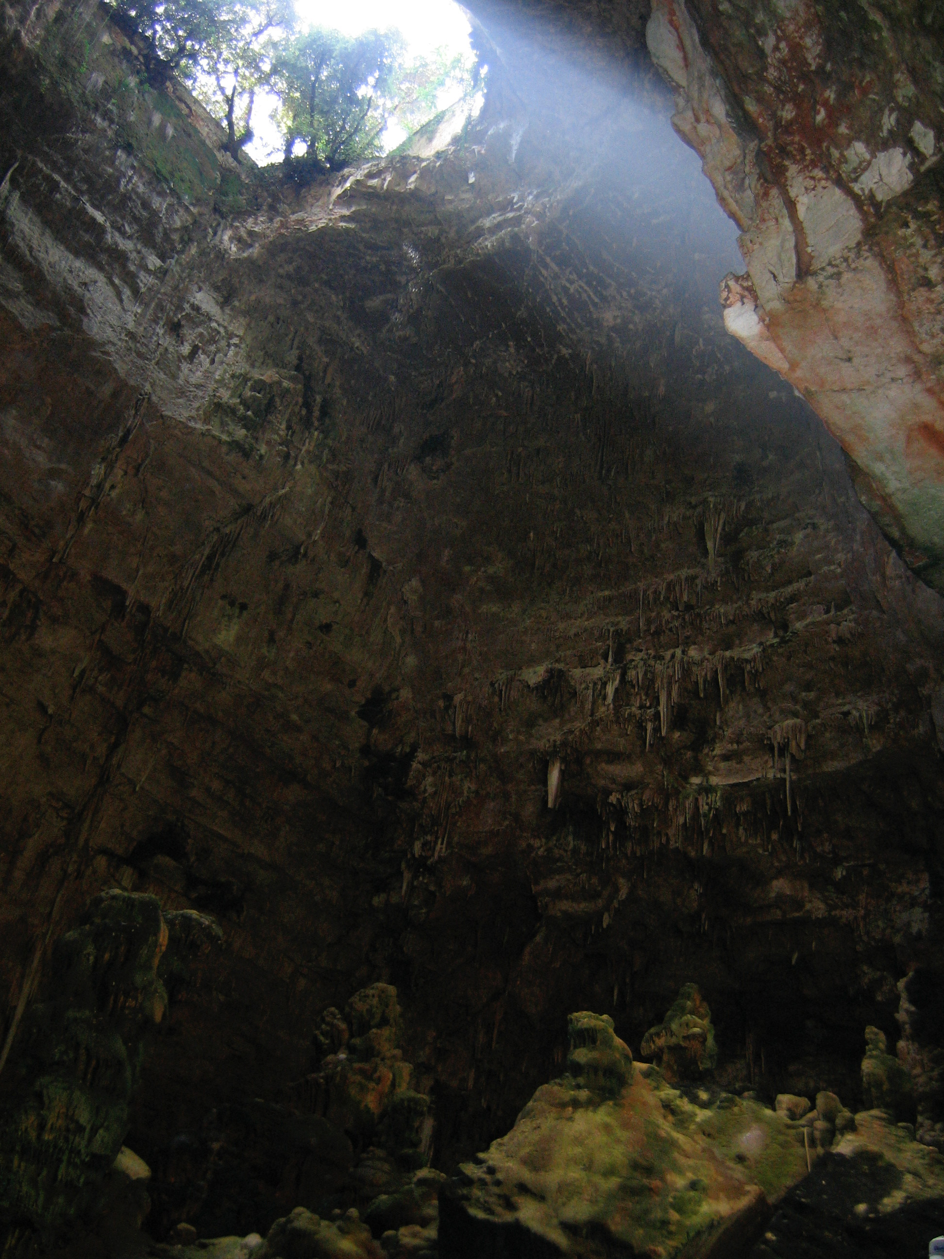 Aven de Castellana, seule partie de la grotte qu'il est autorisé de photographier source personnelle : photo Dominique grassigli